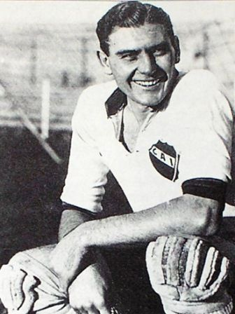 Fernando Bello, arquero de Independiente entre 1933 y 1944.